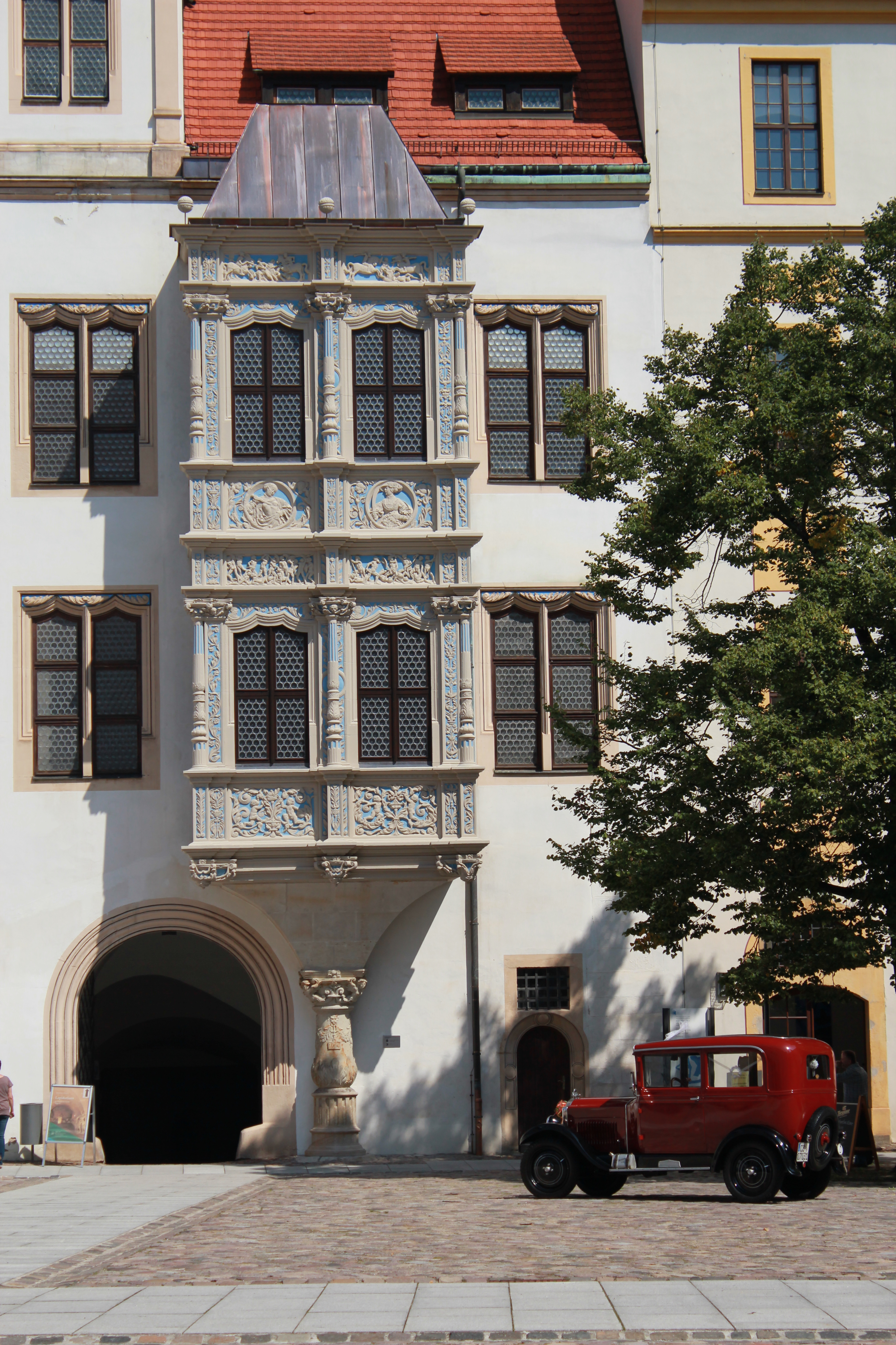 Der 2011 restaurierte Erker, Innenhof Schloss Hartenfels, Torgau, Sachsen